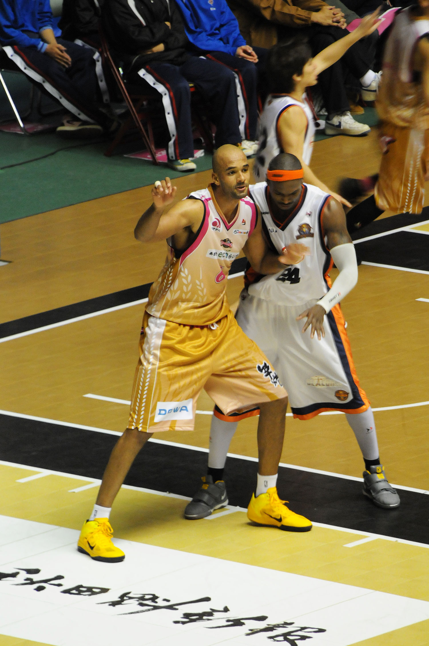 秋田ノーザンハピネッツ、アンソニー・コールマン選手。秋田県立体育館で。